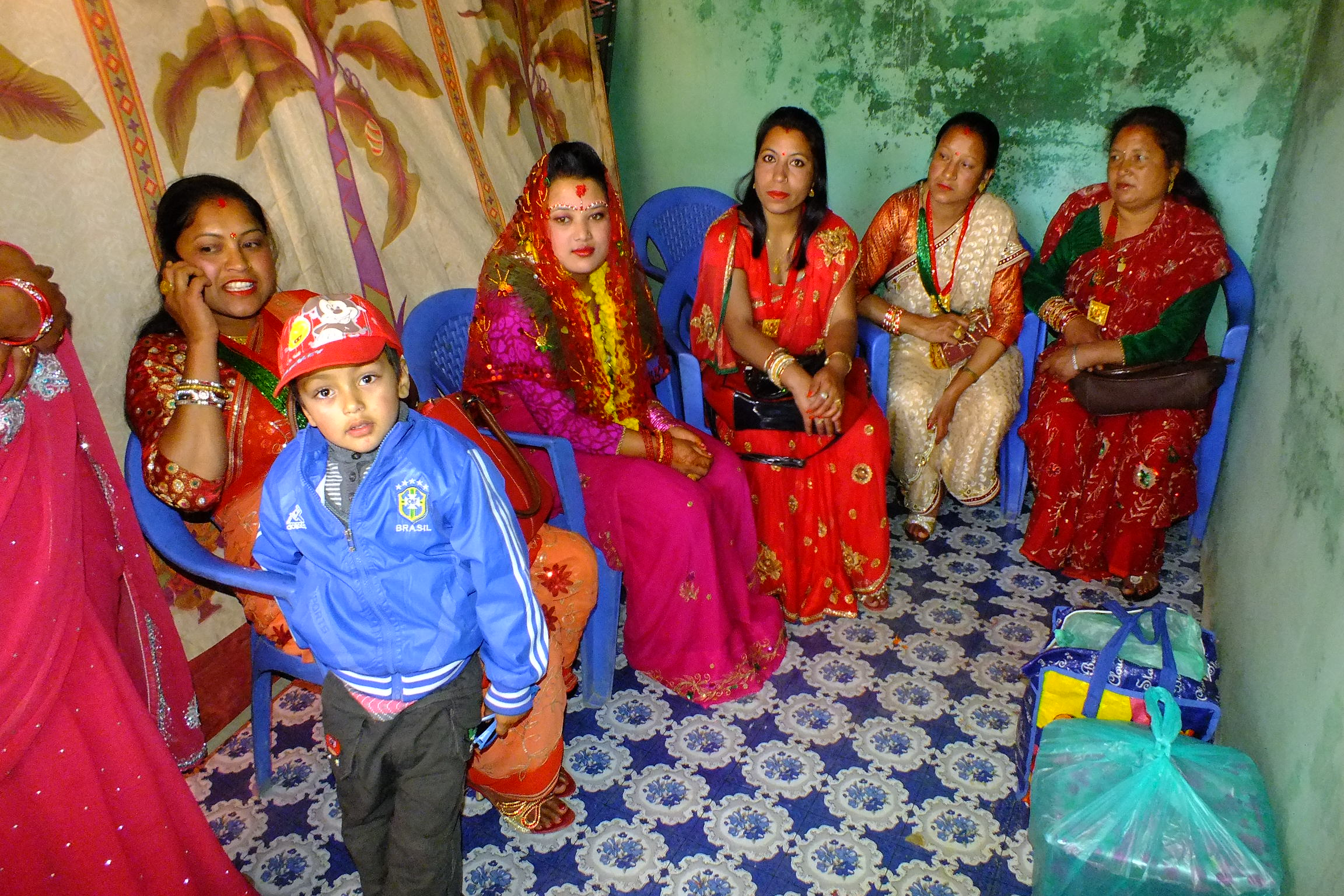 2015-3 Budhanilkantha,Nepal-Wedding ブダニールカンタ寺院付近でのヒンズー結婚式